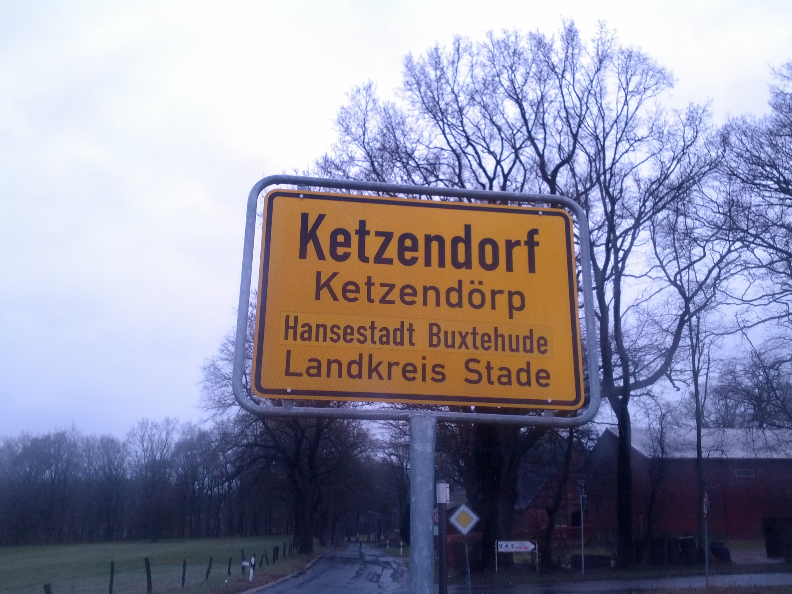 Oortsschild mit den Naam op Hoochdüütsch un op Plattdüütsch